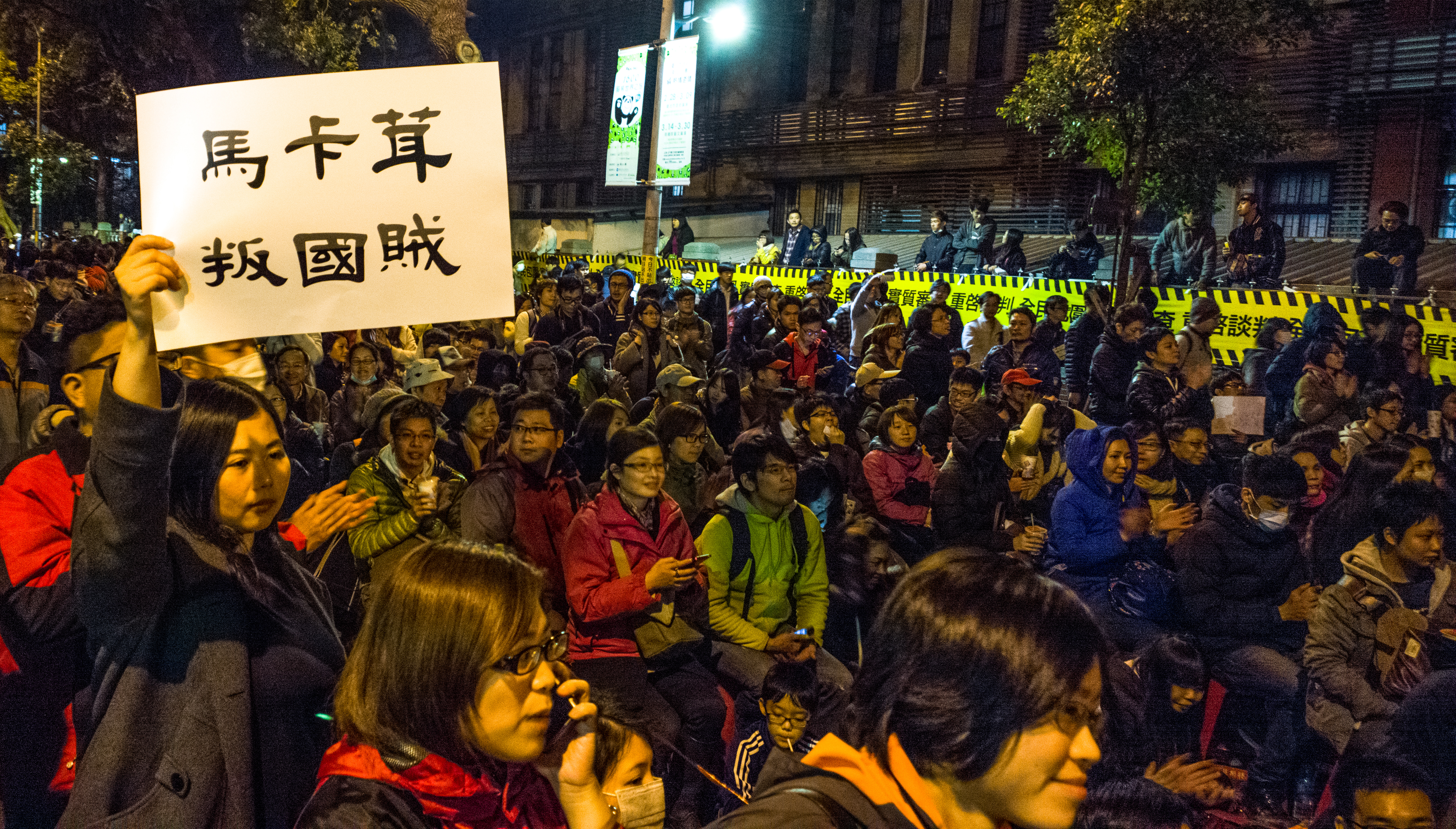 馬卡茸 叛國賊